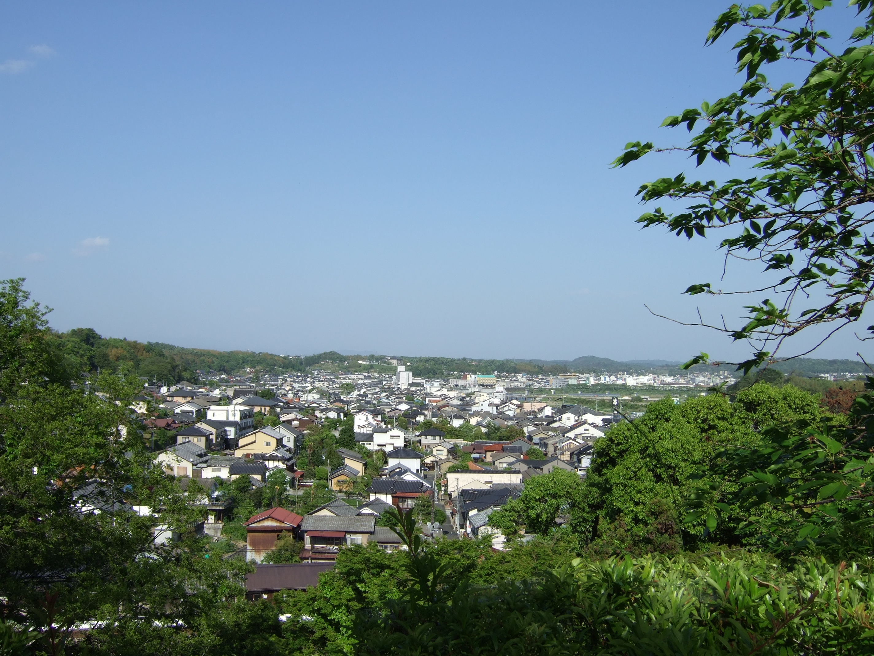 津山市山下 鶴山公園